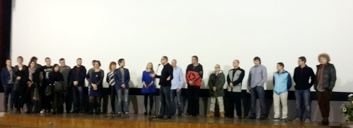 Прэм'ерны паказ фільма "ГараШ". Мінск, кінафестываль "Лістапад". Стваральнікі і акцёры праекта